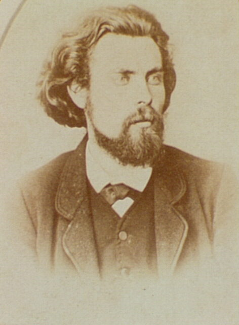 Jules Martelet (1843-1916)